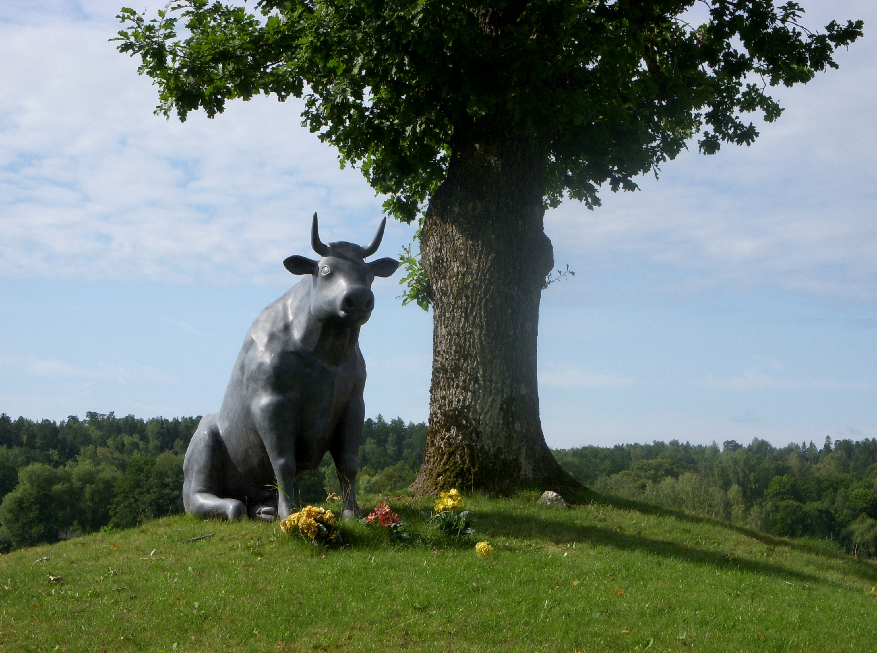 Tjuren "Ferdinand" under en vanlig ek på Helgö, Ekerö kommun